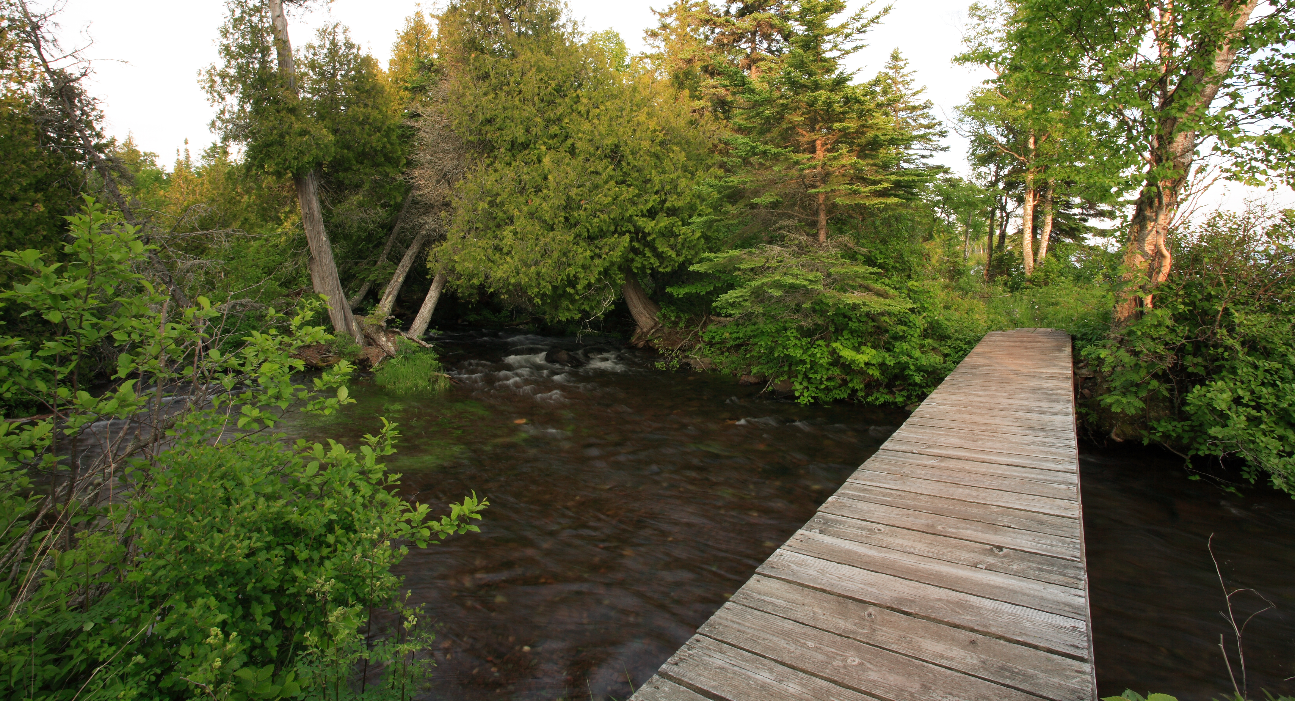 A boardwalk spanning Siskiwit River